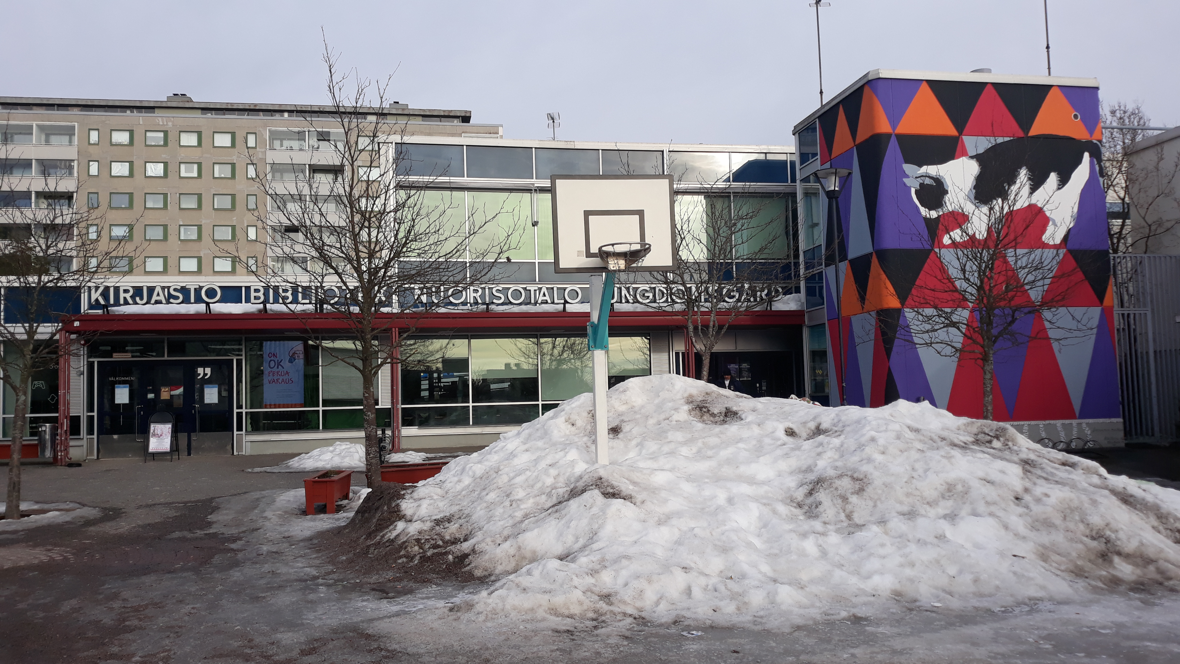 Biblioteca i centre cívic de Kontula